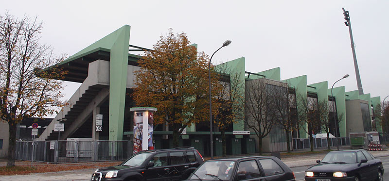 Grünwalder Stadion; 60er Stadion